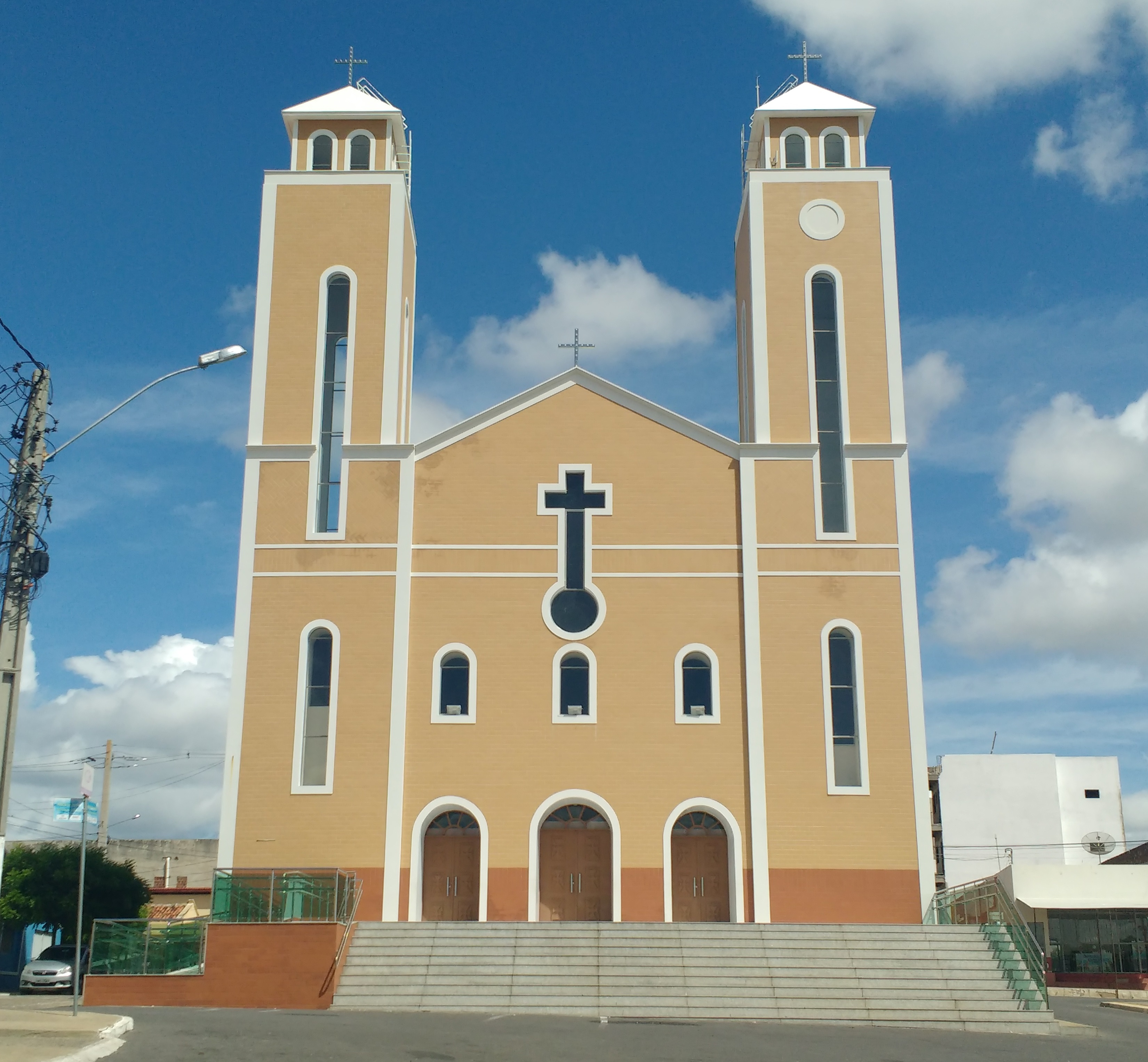 Vista frontal da Igreja Matriz de Nossa Senhora da Conceição, da Diocese de Santa Luzia de Mossoró, no centro de Pau dos Ferros, Rio Grande do Norte (Brasil).